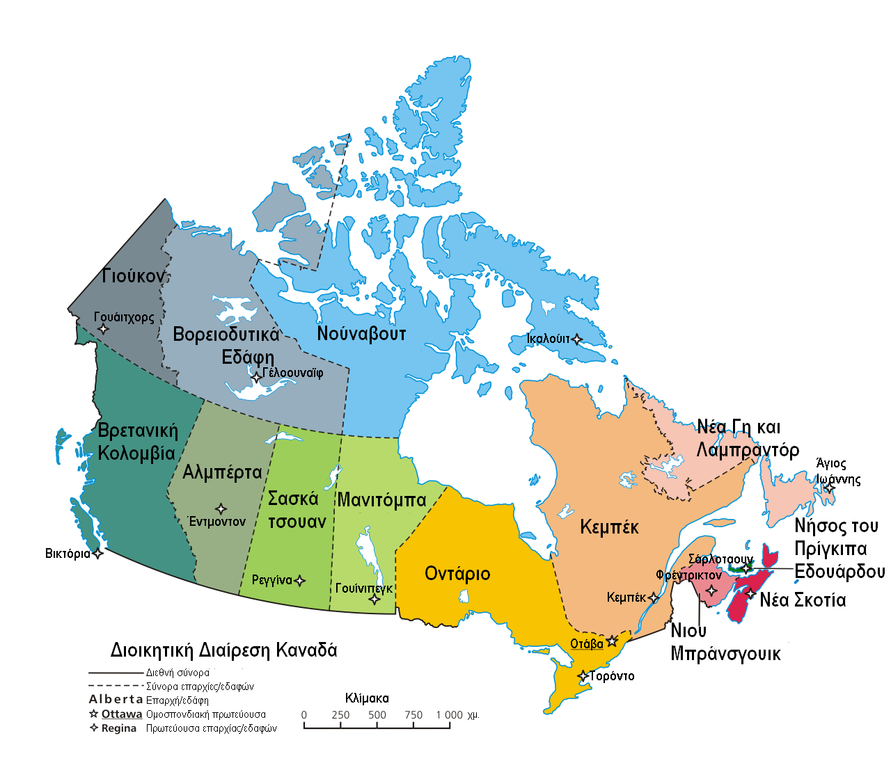 Διοικητική διαίρεση του Καναδά